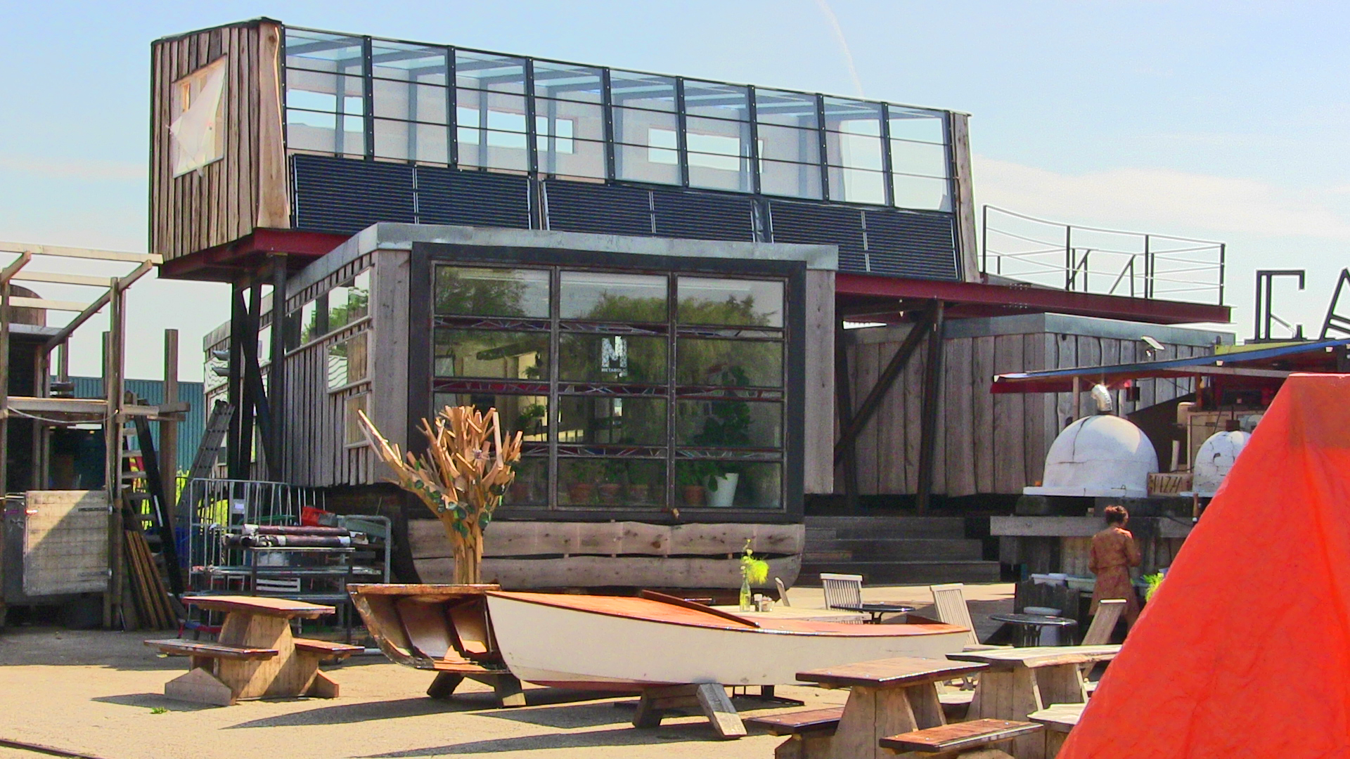 Projektgebiet "De Ceuvel" in Amsterdam-Noord